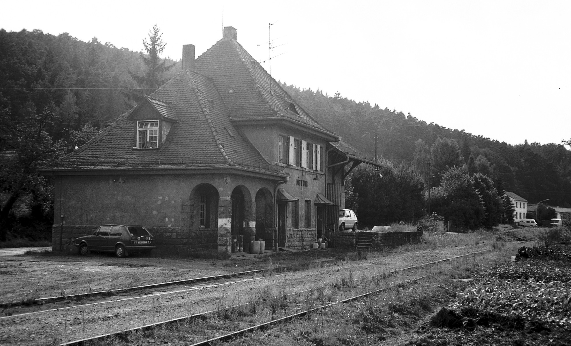 Dittwar-Bahnhof. 1984 lagen noch Gleis 1 und Gleis 2. Überdachter Aussenbereich des Wartesaals mit drei schönen Rundbögen. Ganz rechts daneben die ehemalige Stückgutlagerhalle mit Kopfladerampe.